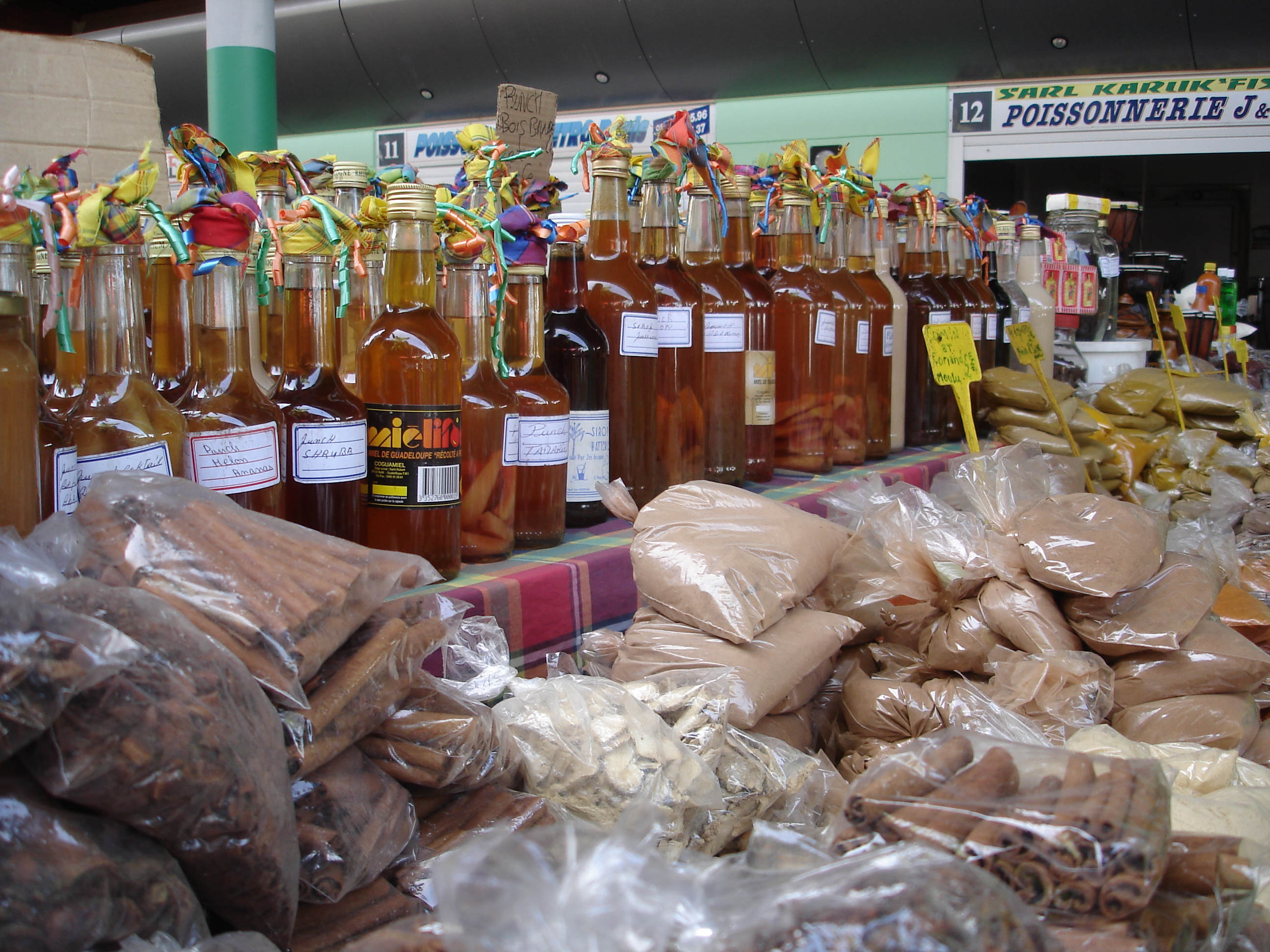 Vue sur les étales du marché de Basse-Terre où l'on peut voir des épices de toutes sortes. (Guadeloupe) - France